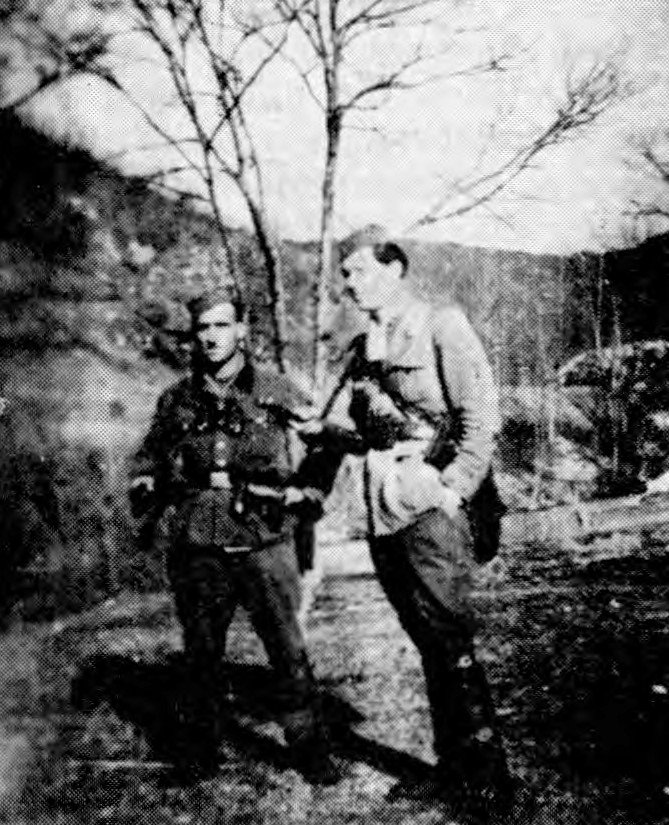 Komandir Diavat Akimov (levo) in politični komisar Vinko Tomc (desno) ruske čete 1. bataljona Gradnikove brigade.